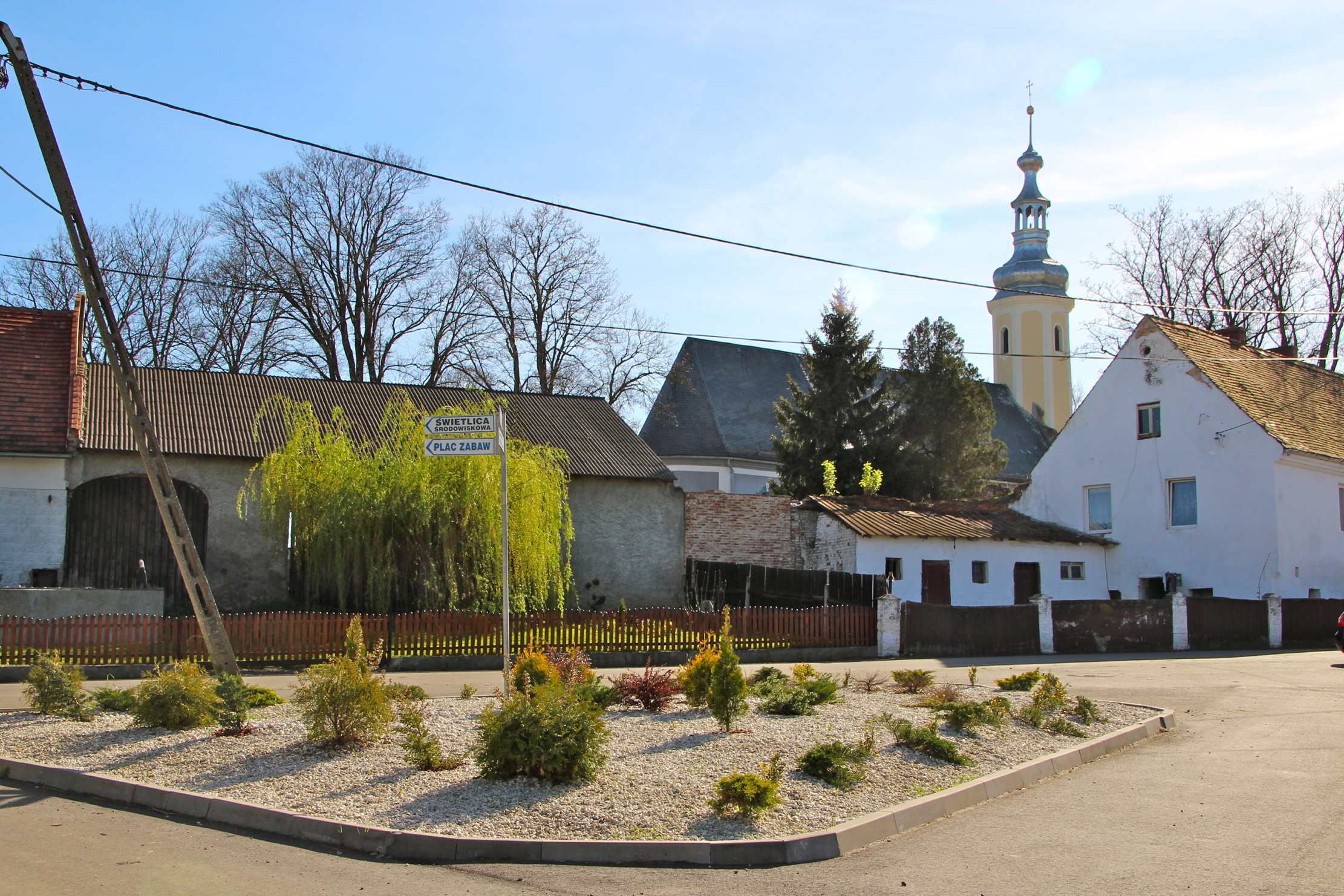 Kazimierz – wieś w Polsce położona w województwie opolskim, w powiecie prudnickim, w gminie Głogówek.